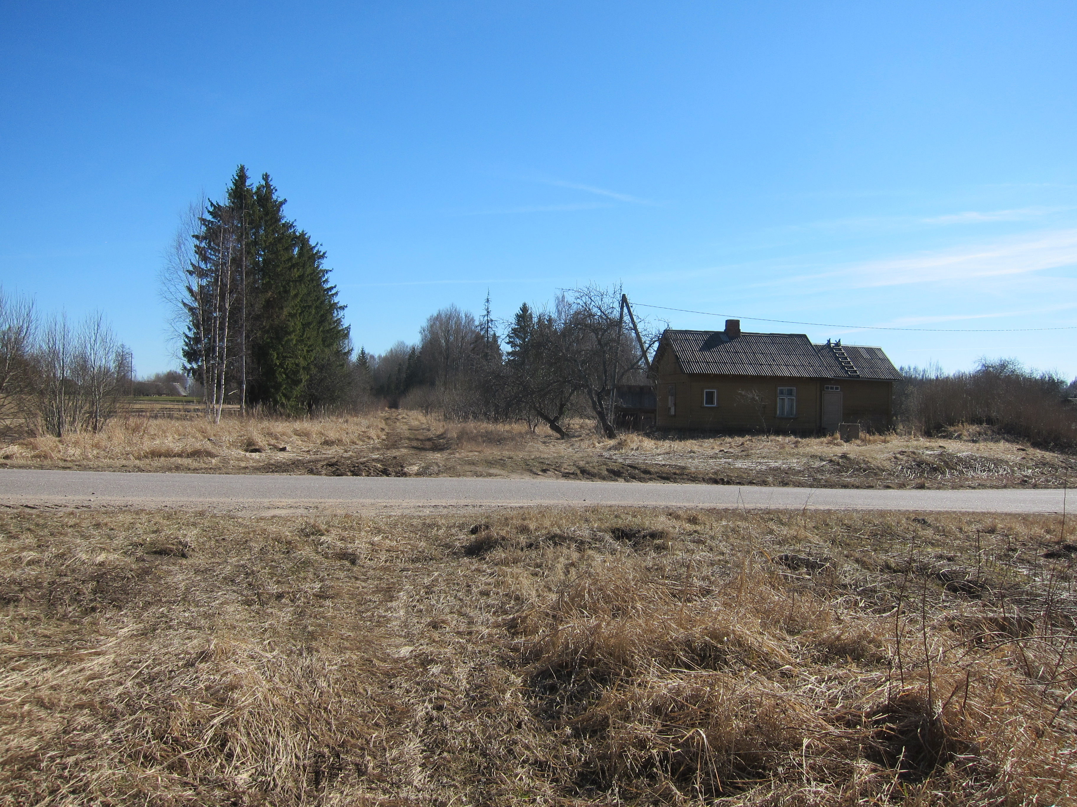 Puikules stacija. Bijusī šaursliežu pārbrauktuve